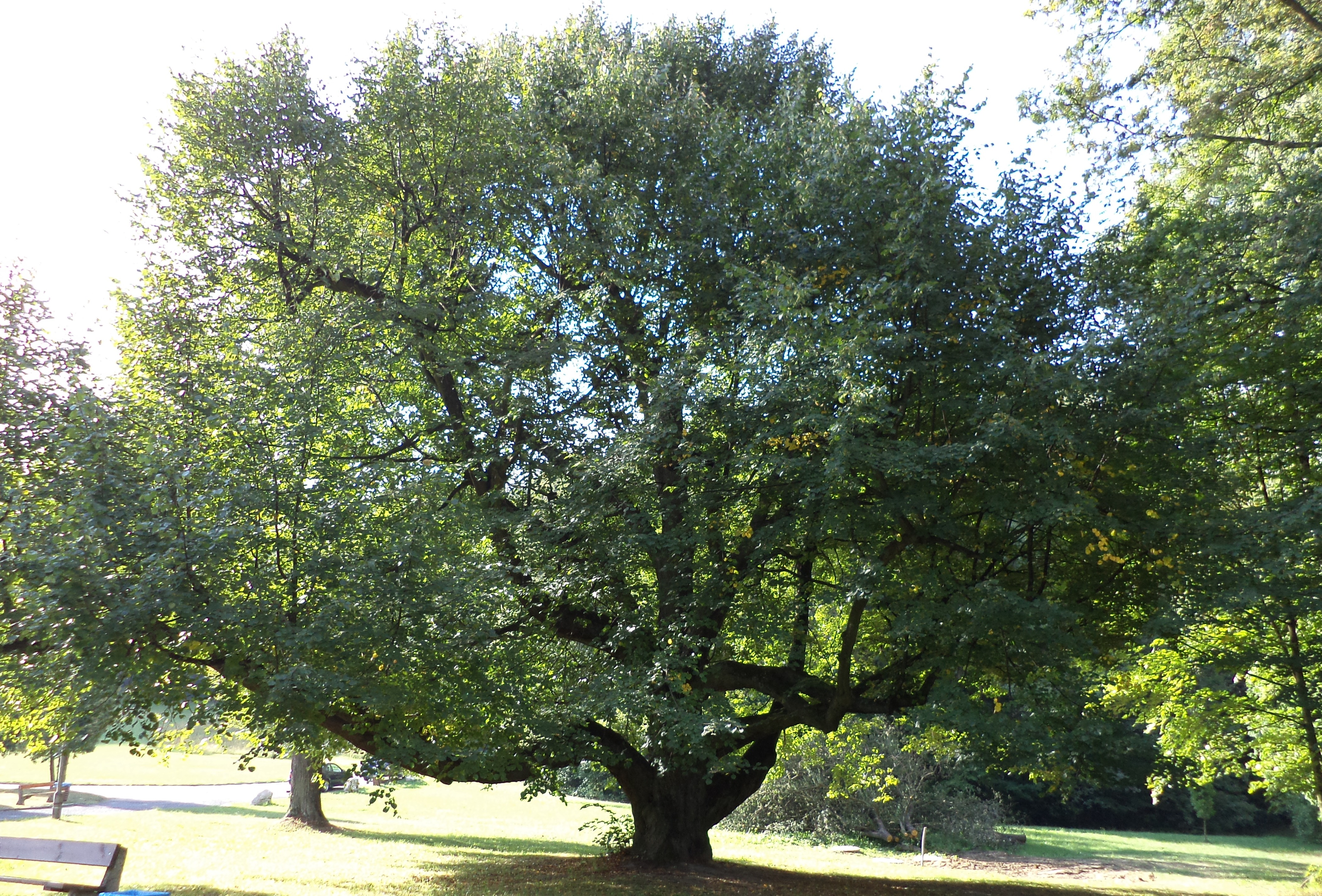 Lipa drobnolistna na terenie zabytkowego parku w Reptach - pomnik przyrody